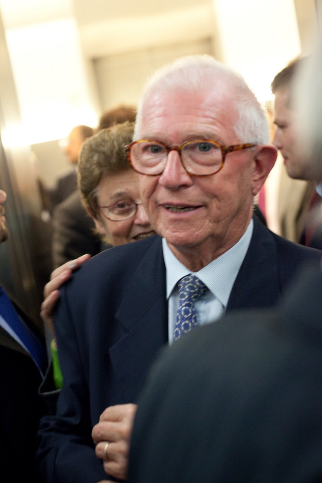 Jean-Pierre Fourcade à l'inauguration du bâtiment Microsoft d'Issy-les-Moulineaux